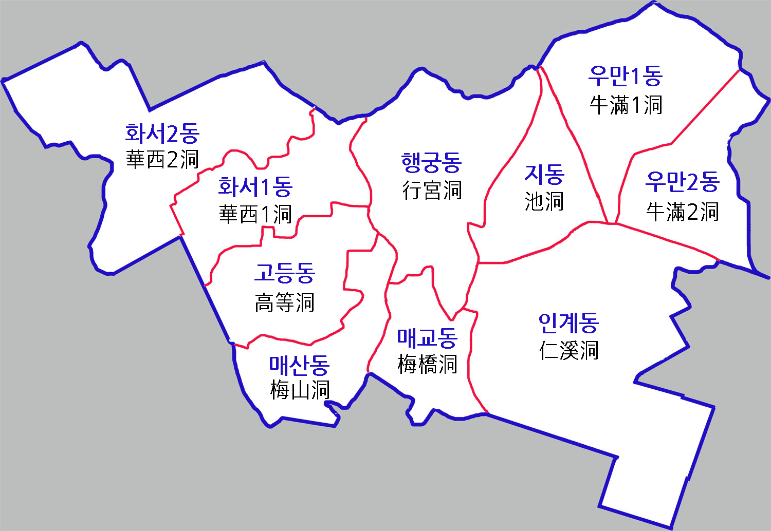 수원시 팔당구 행정구역도